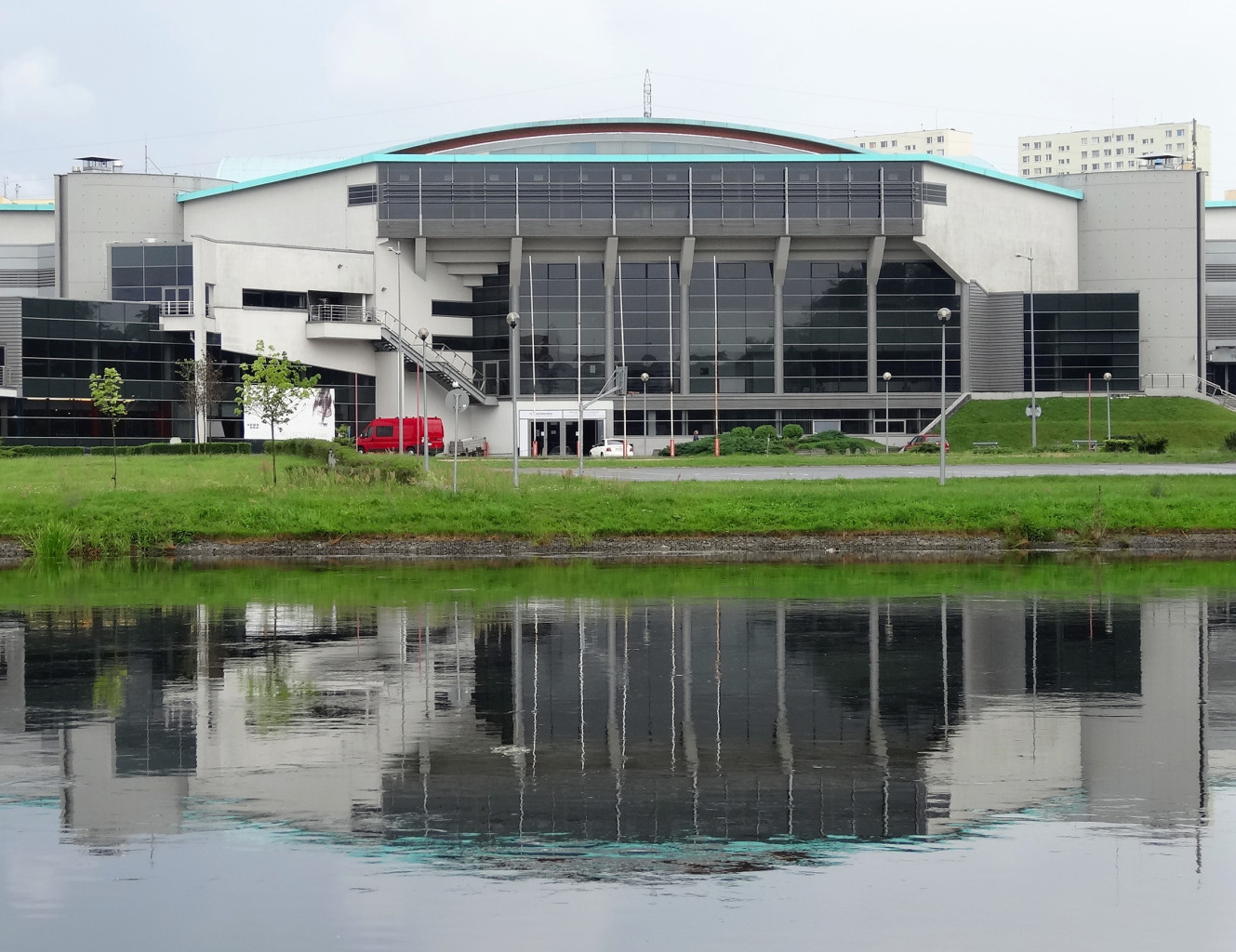 Hala widowiskowo-sportowa "Łuczniczka" w Bydgoszczy - widok od strony Brdy